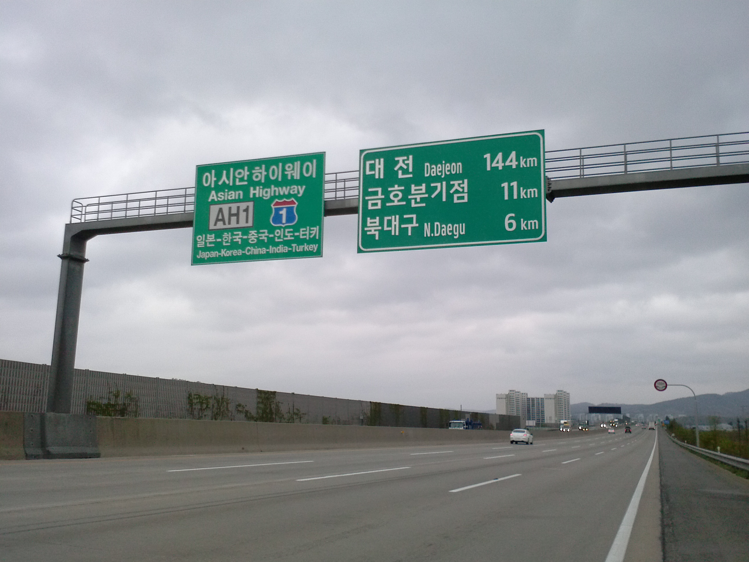 AH1 표지판, 경부고속도로 도동분기점-북대구나들목 사이